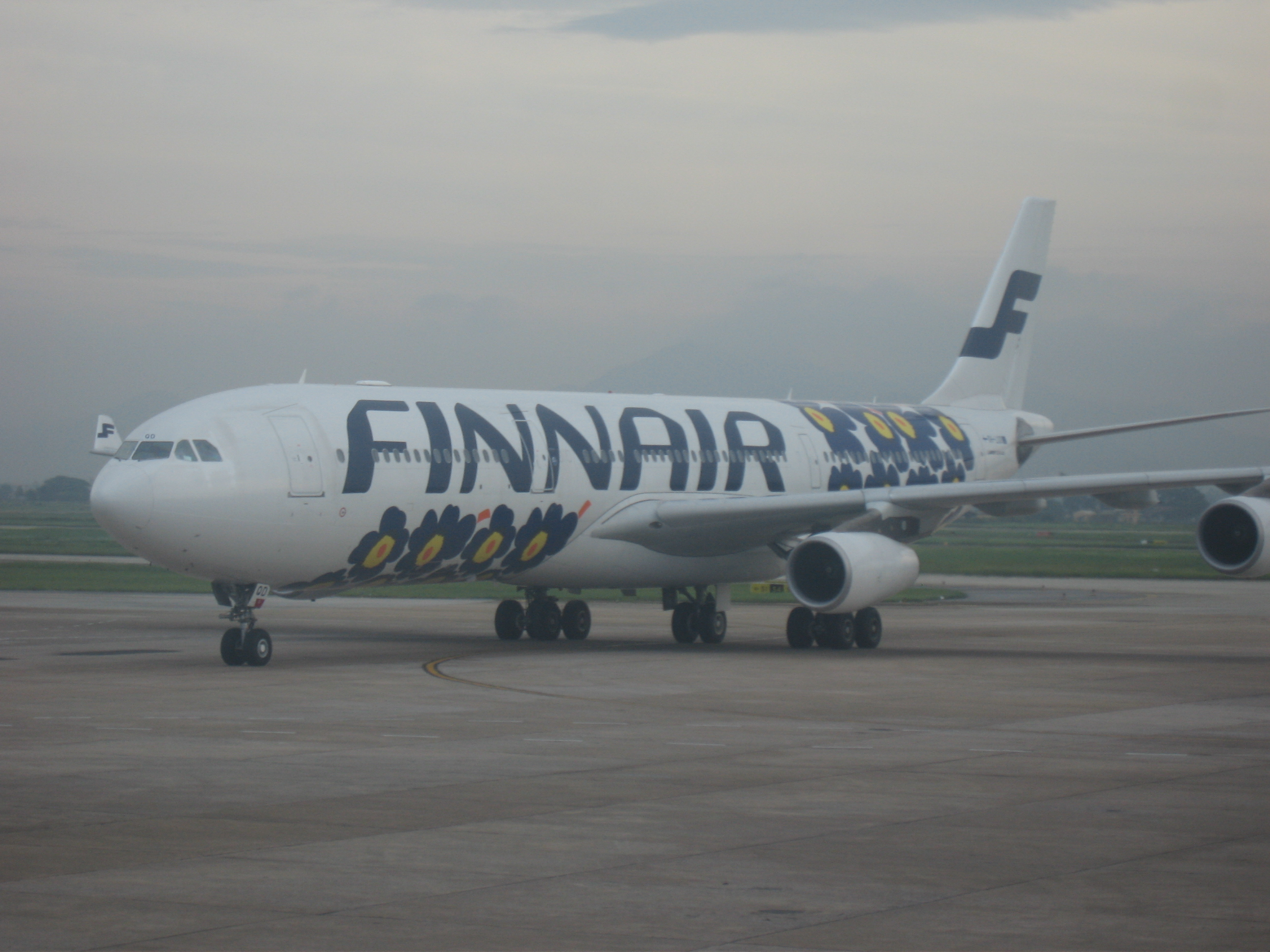 A Finair's plane at Noi Bai International Airport